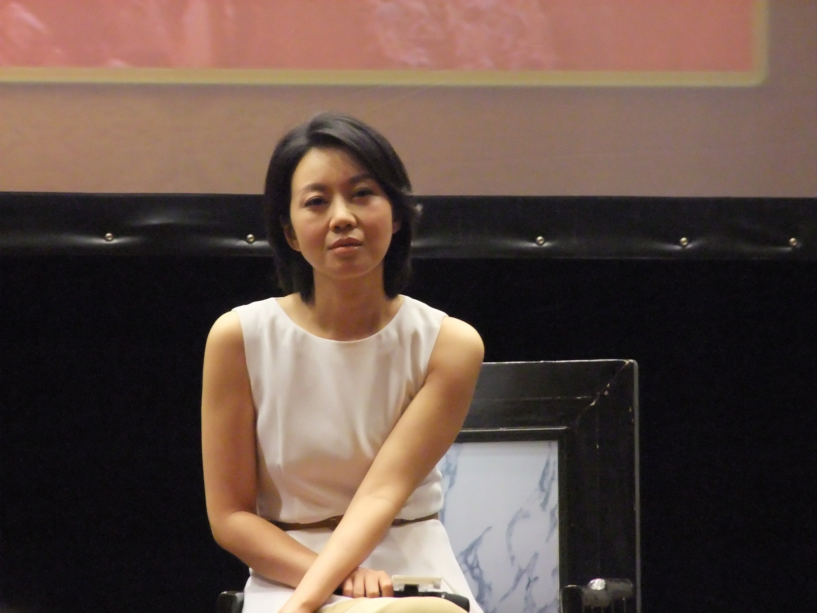 110925 电影《画壁》首映见面会 邓超.闫妮等 渣渣图